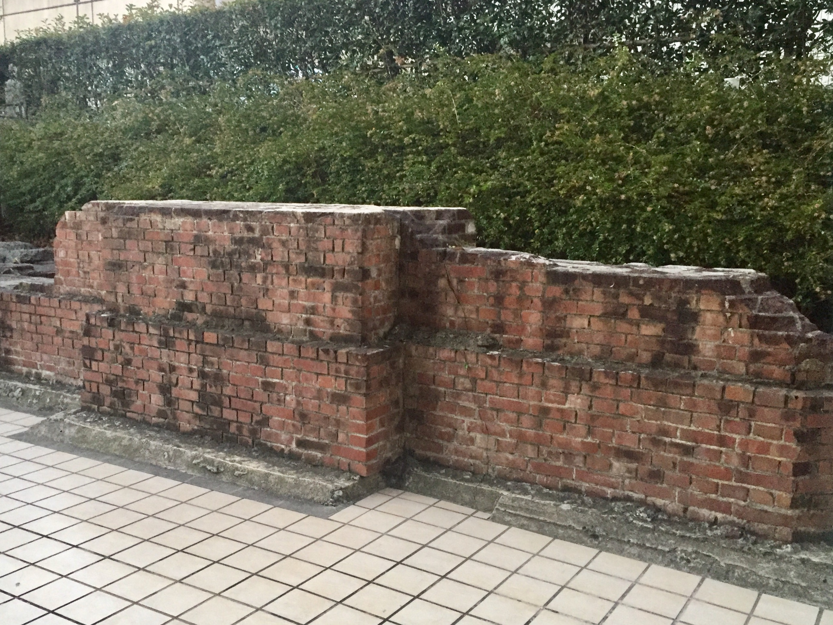 二代目横浜駅（1915年〈大正4年〉〜1923年〈大正12年〉）の遺構。現在の高島町駅付近（国道1号「高島町交差点」脇）にある、関東大震災後の火災により焼失した駅舎の基礎部分。